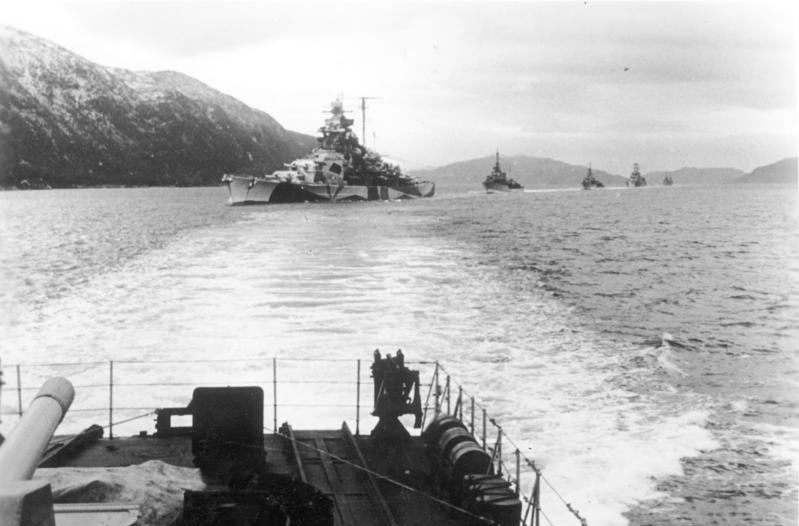 ADN-ZB/Archiv II.Weltkrieg 1939 - 45 In den Gewässern vor der norwegischen Küste sichern Zerstörer der faschistischen deutschen Kriegsmarine schwere Einheiten, Oktober 1942 Boeckmann, PK